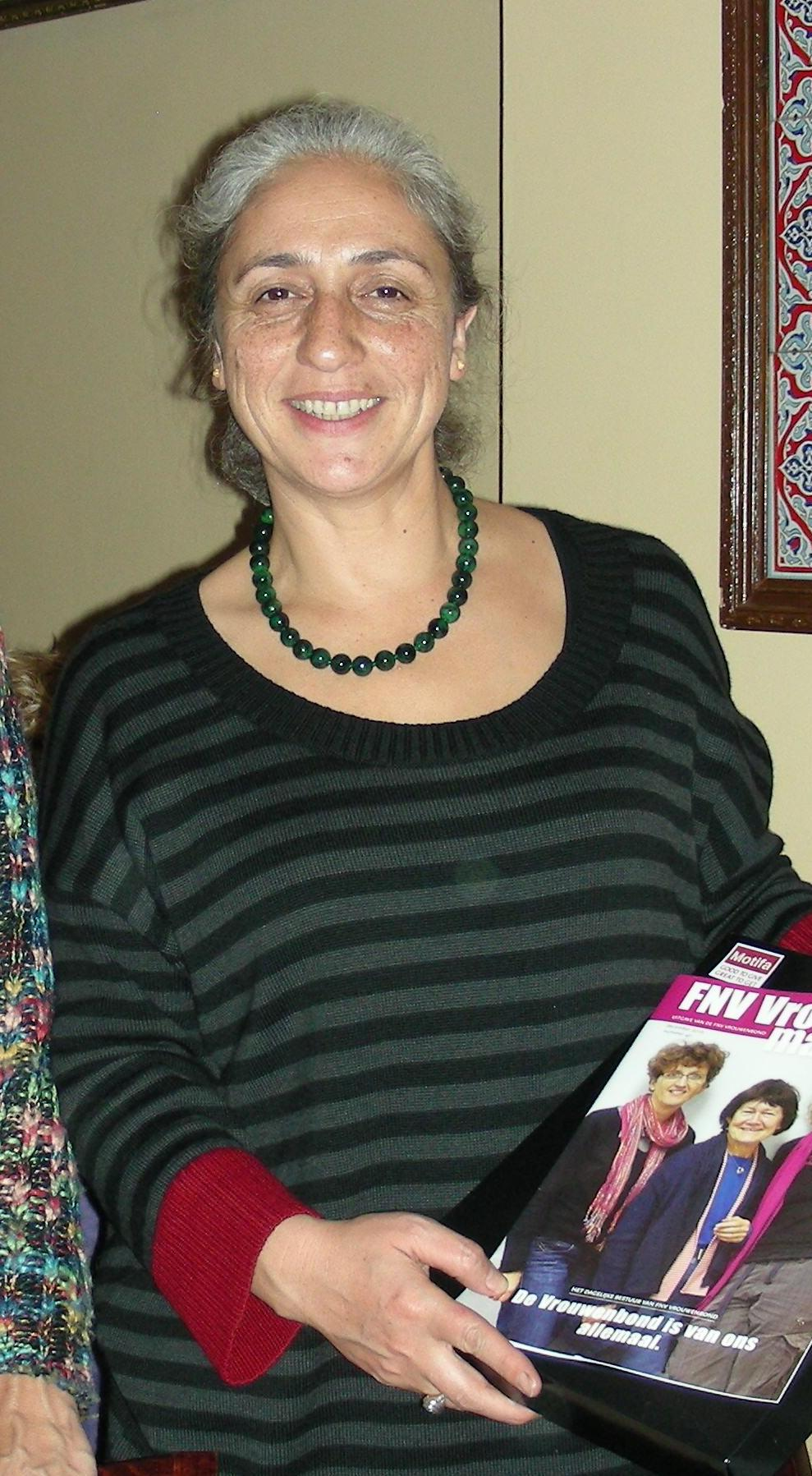 Anya Wiersma (FNV Vrouwenbond) en Farah Karimi (directeur Oxfam Novib)